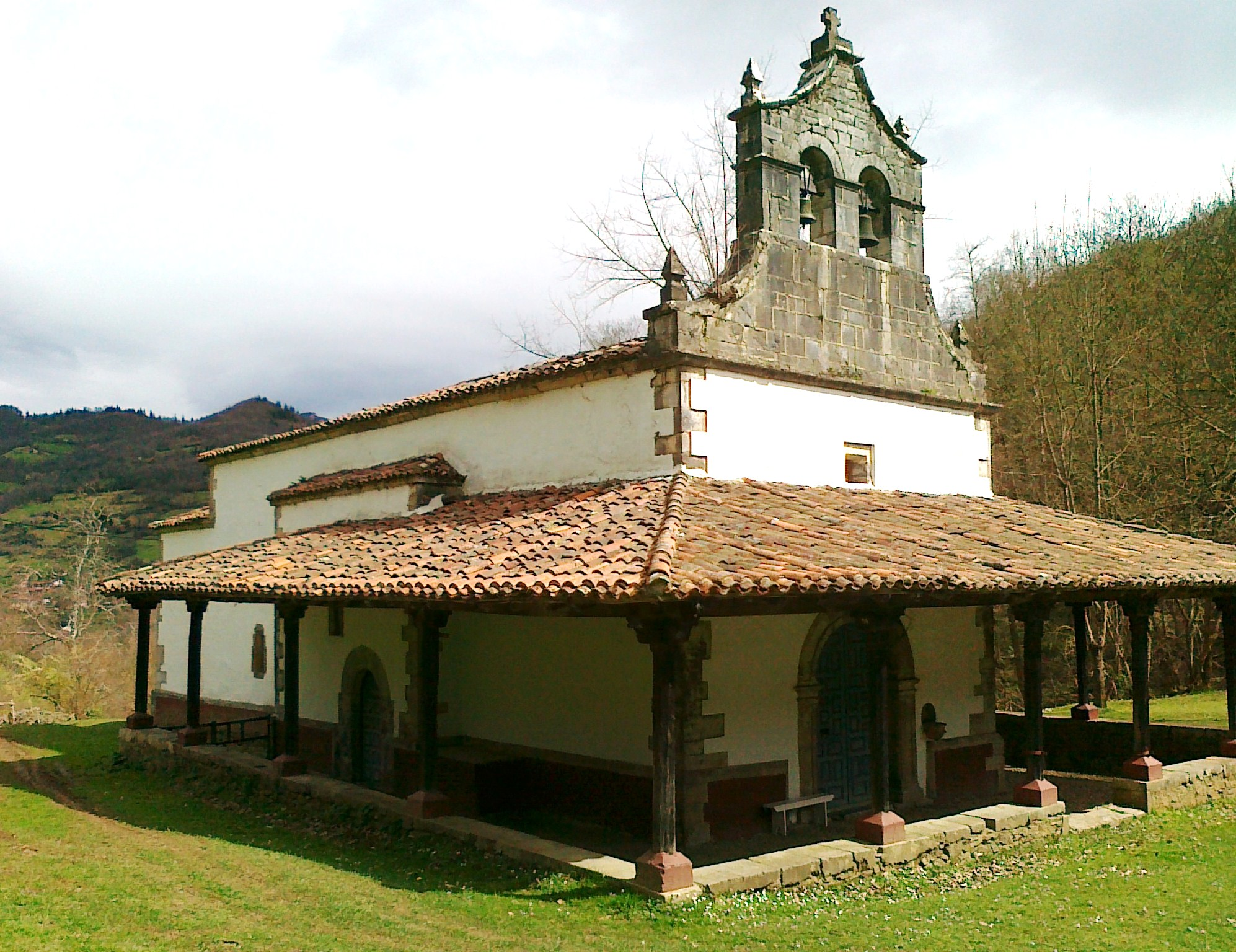 Santuario de Miravalles, lado sur-oeste